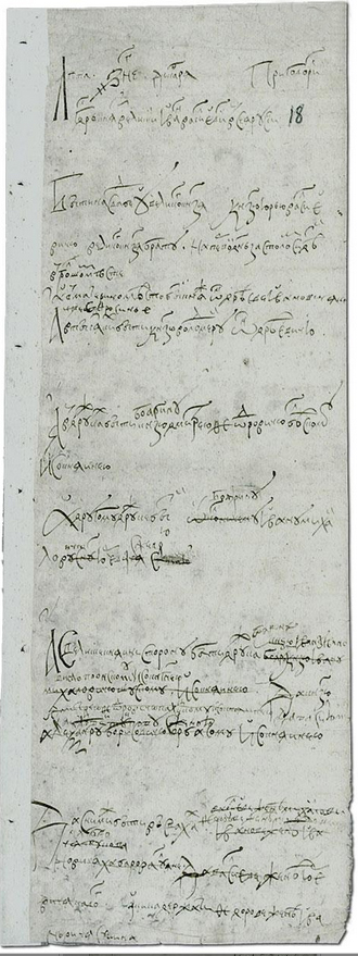 Чиновный свадебный список бракосочетания царя Ивана IV Васильевича с Анастасией Романовной Захарьиной-Юрьевой, дочерью боярина Романа Захарьина-Юрьева. 1546 г. декабря. РГАДА. Ф. 135. Государственное древлехранилище хартий и рукописей. Отд. IV. Рубр. II. № 5. Л. 18. Черновик. В составе московского великокняжеского архива. Из дела о бракосочетании царя Ивана IV Васильевича с Анастасией Романовной Захарьиной-Юрьевой. _______ «Лета 7055-г декабря. Приговорил государь князь великий Иван Васильевич всеа Руси. Быти на свадьбе у великого князя князю Юрью Васильевичу, великог князя брату, на первой день за столом сидети в большом месте. А в матернино место быть княж Ондреева Ивановича княине Ефросинье. А в тысяцких бытии князю Володимеру Ондреевичу. А в дружках быти боарину князю Дмитрею Феоровичу Бельскому и со княинею. А другому дружке бытии боярину [зачеркнуто: окольничему] Ивану Михайловичу [зачеркнуто: у сыну] Юрьева с женою.»